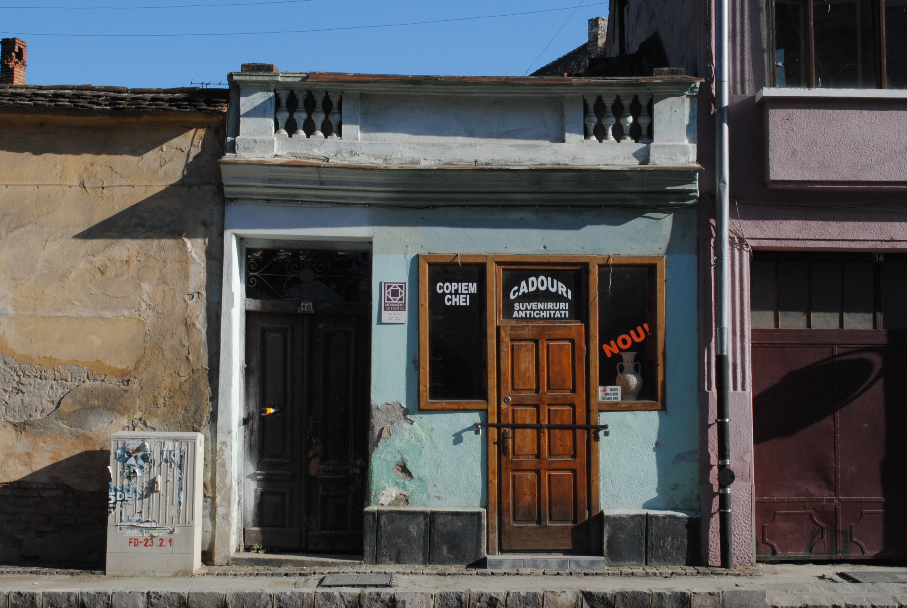 Casă, mijl. sec. XIX, înc. sec. XX